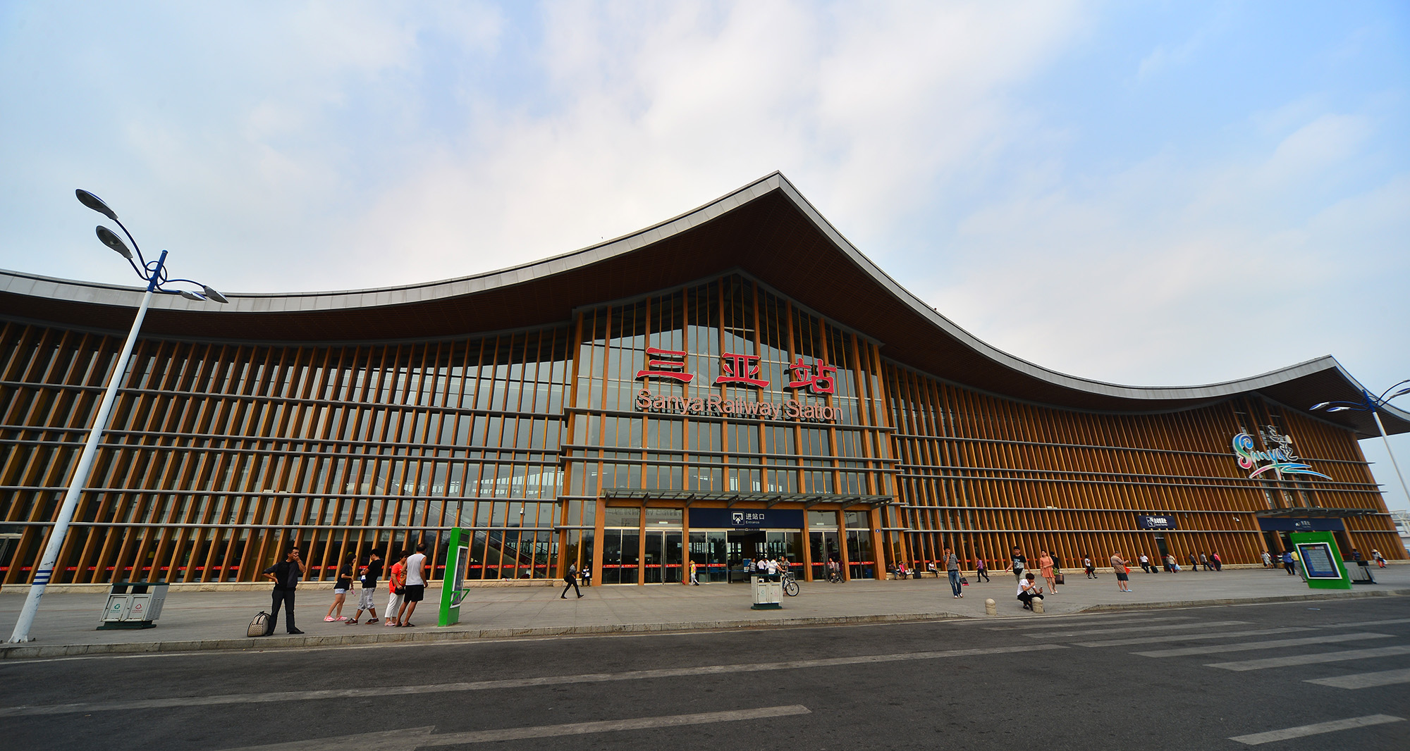 海南省三亚站